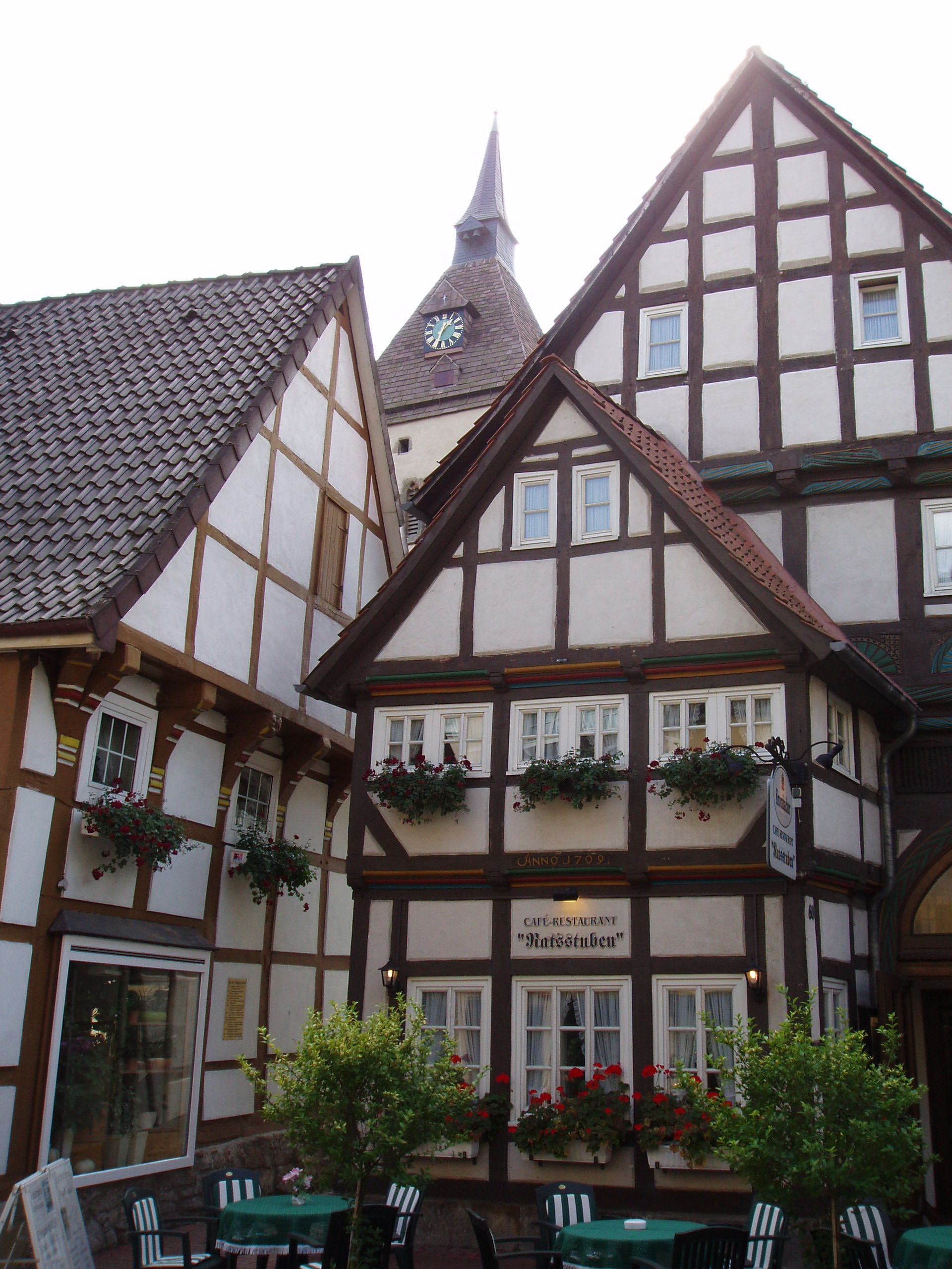 Hessisch Oldendorf, Fachwerkbauten.jpg